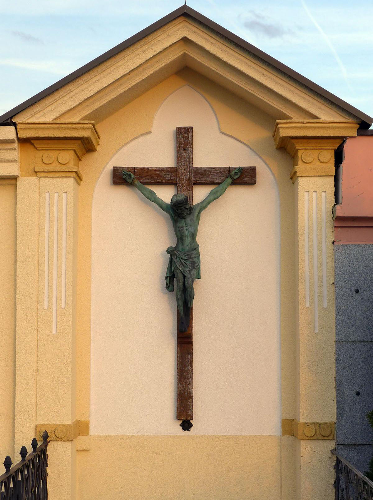 Perg in Oberösterreich. Friedhof am Kalvarienberg (eingeweiht 1892). Friedhofsmauer mit Kruzifix.